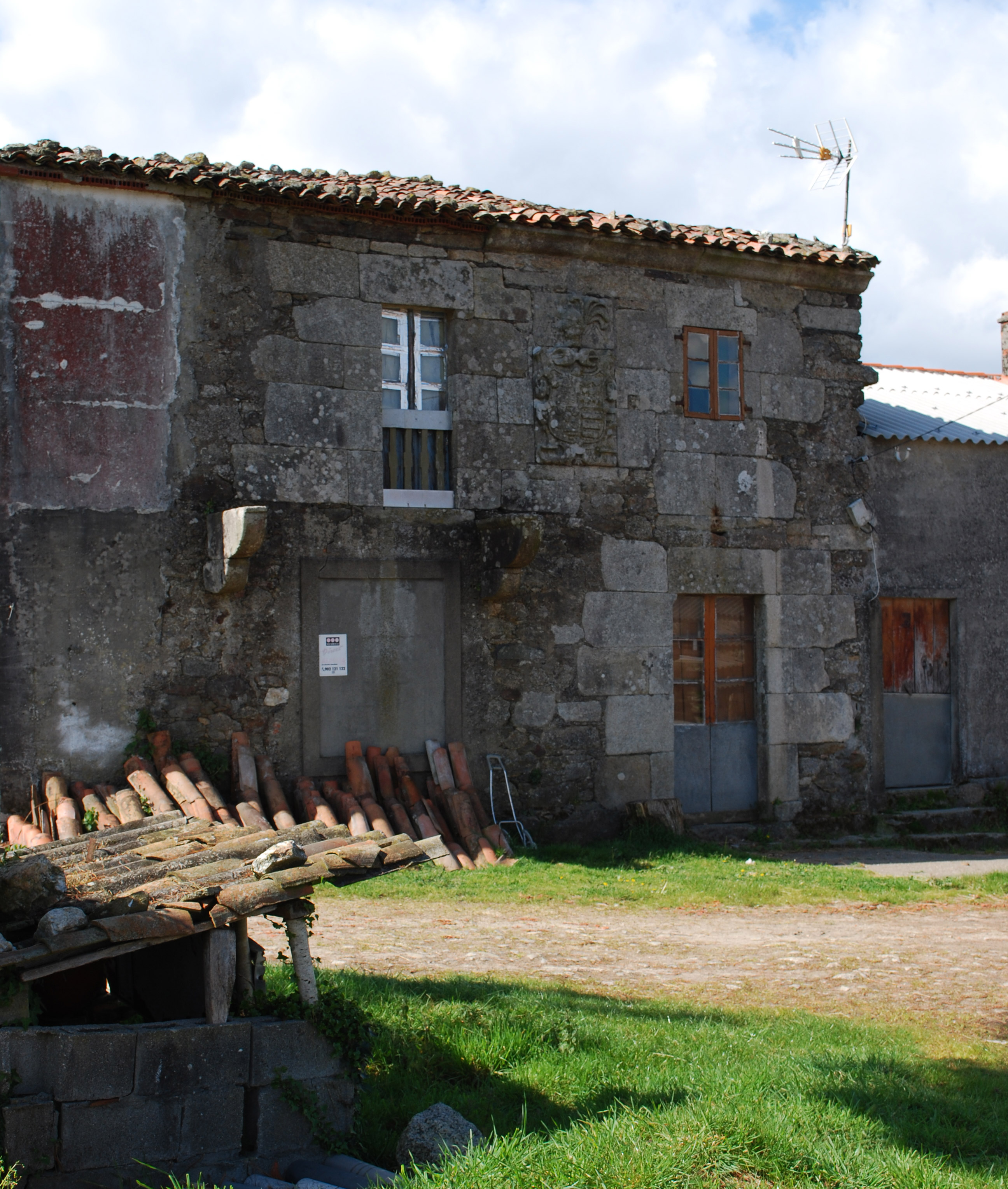 Casa en Balter, Curtis A Coruña Fisteus